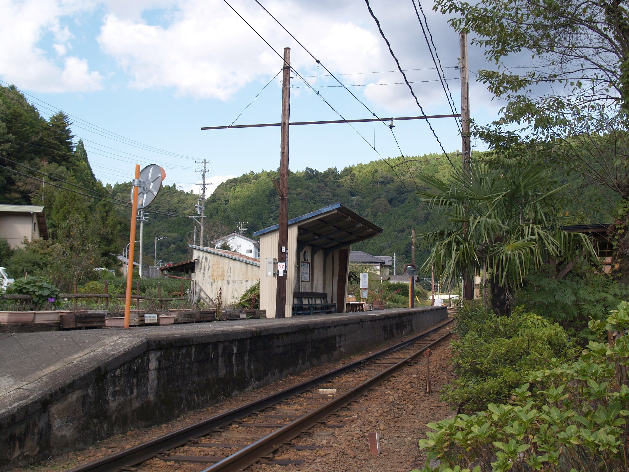 崎平駅